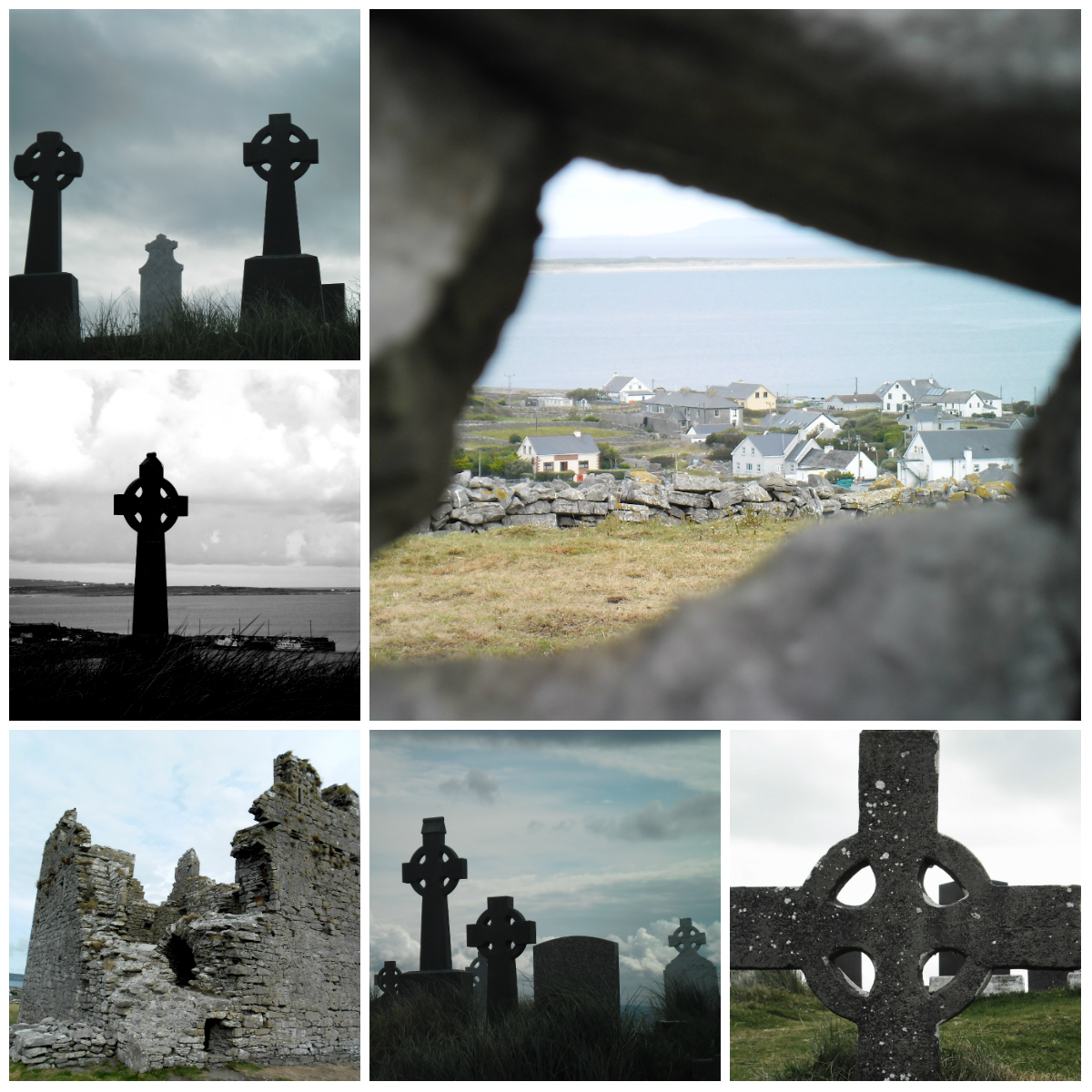 Mosaïque Inisheer, îles d'Aran